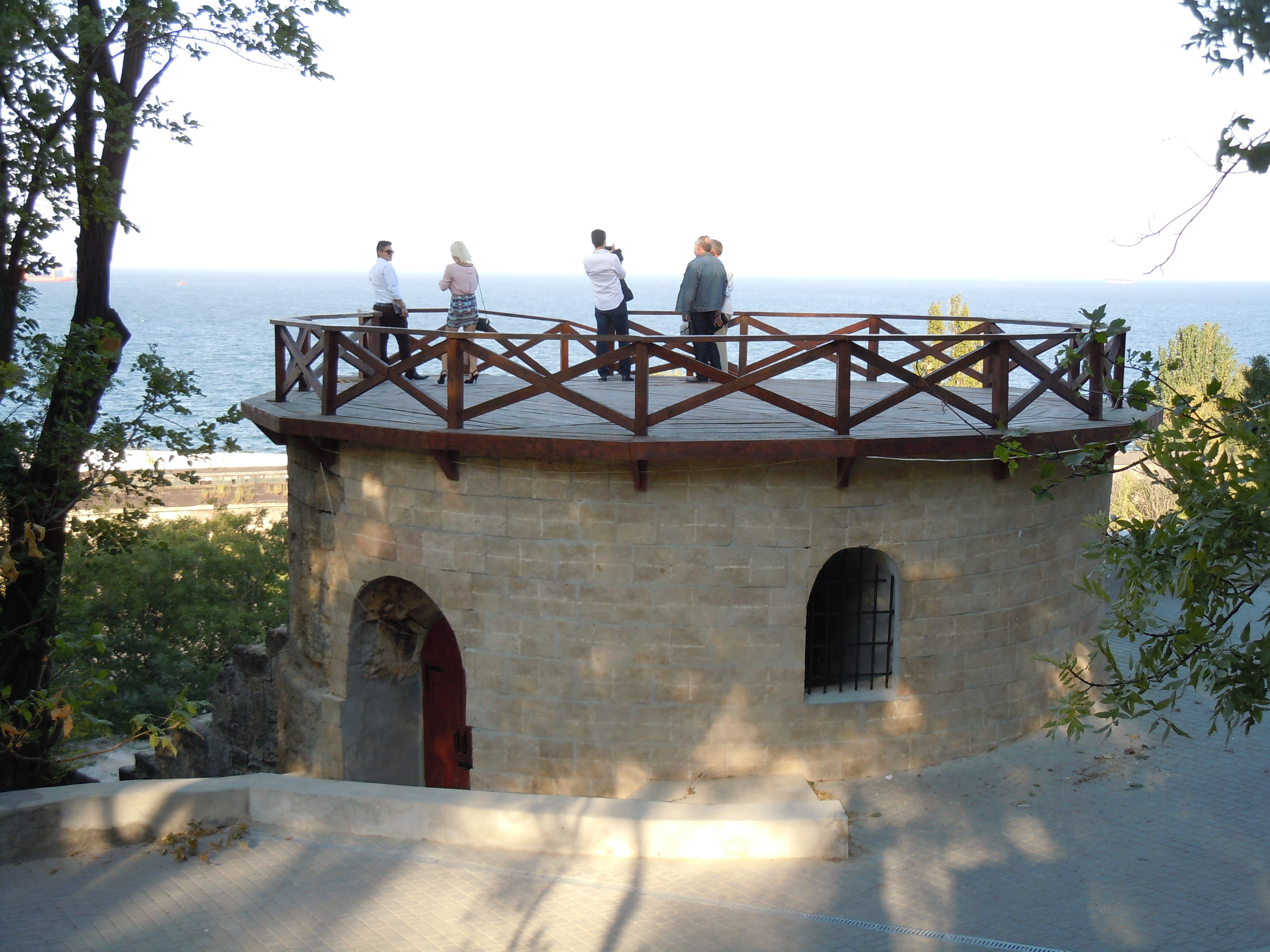 Відновлена Сторожова башта Одеського карантину